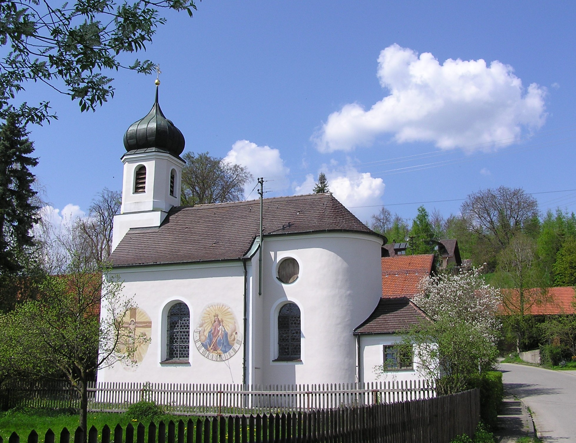 Starnberg-Landstetten, St.-Jakob-Straße 5, Kath. Filialkirche St. Jakobus. Kleiner Rokokobau, 1768 von Leonhard Matthäus Gießl errichtet.